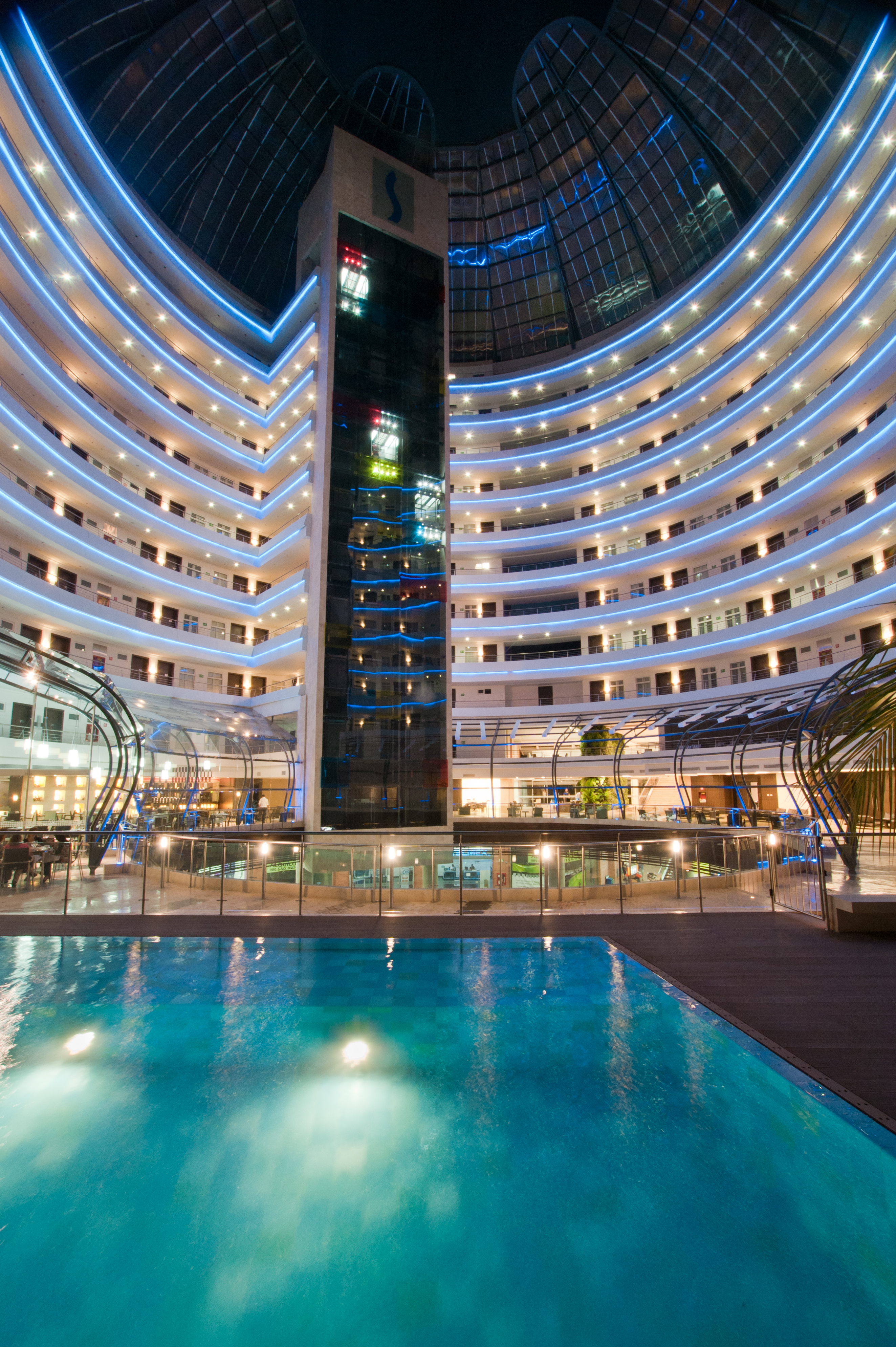 Vista del imponente Hotel Spiwak en la ciudad de Cali.